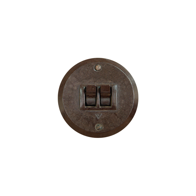 Wyłącznik hebelkowy, 1941 rok.